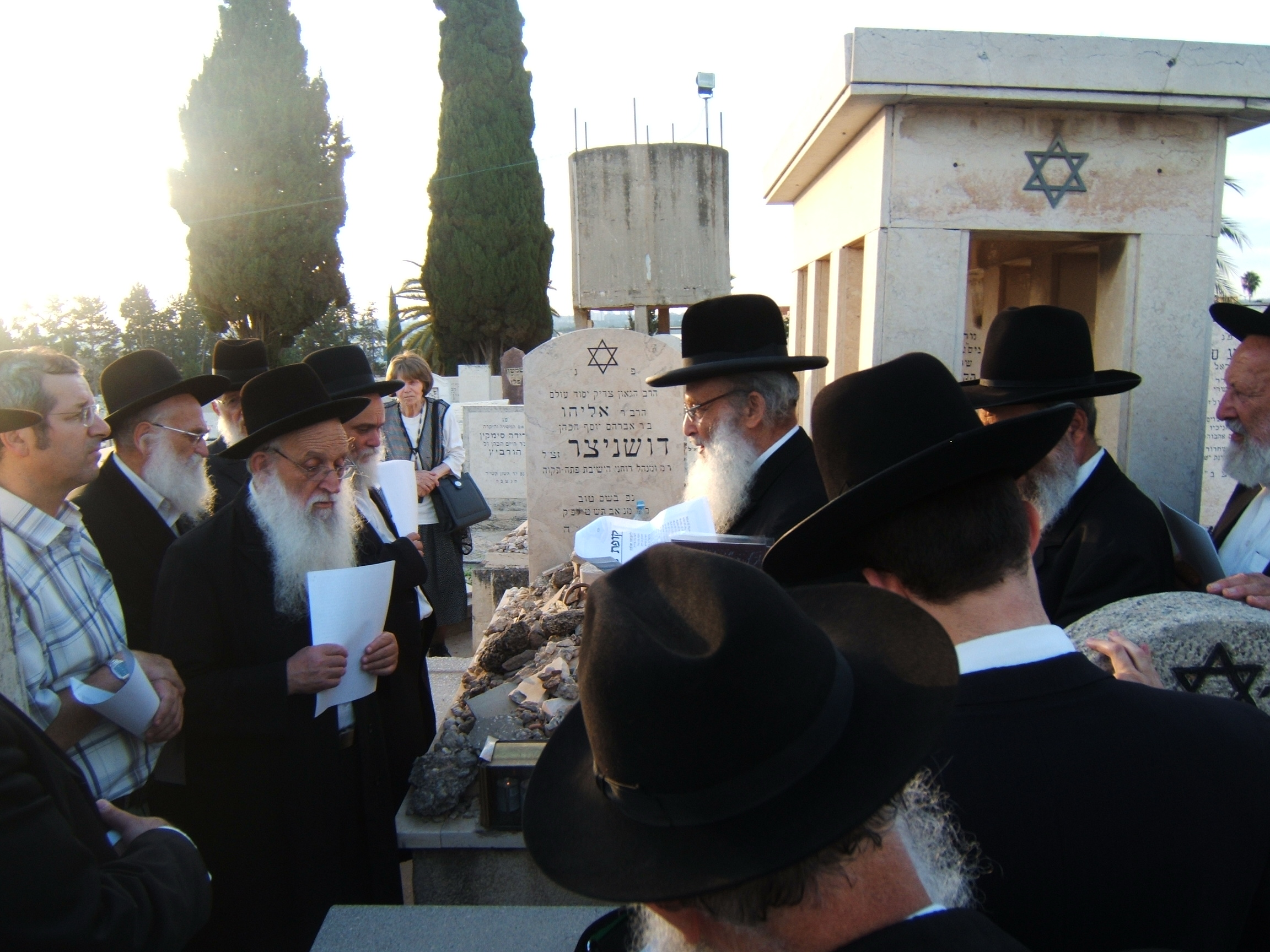 תפילה על ציון הרב דושניצר